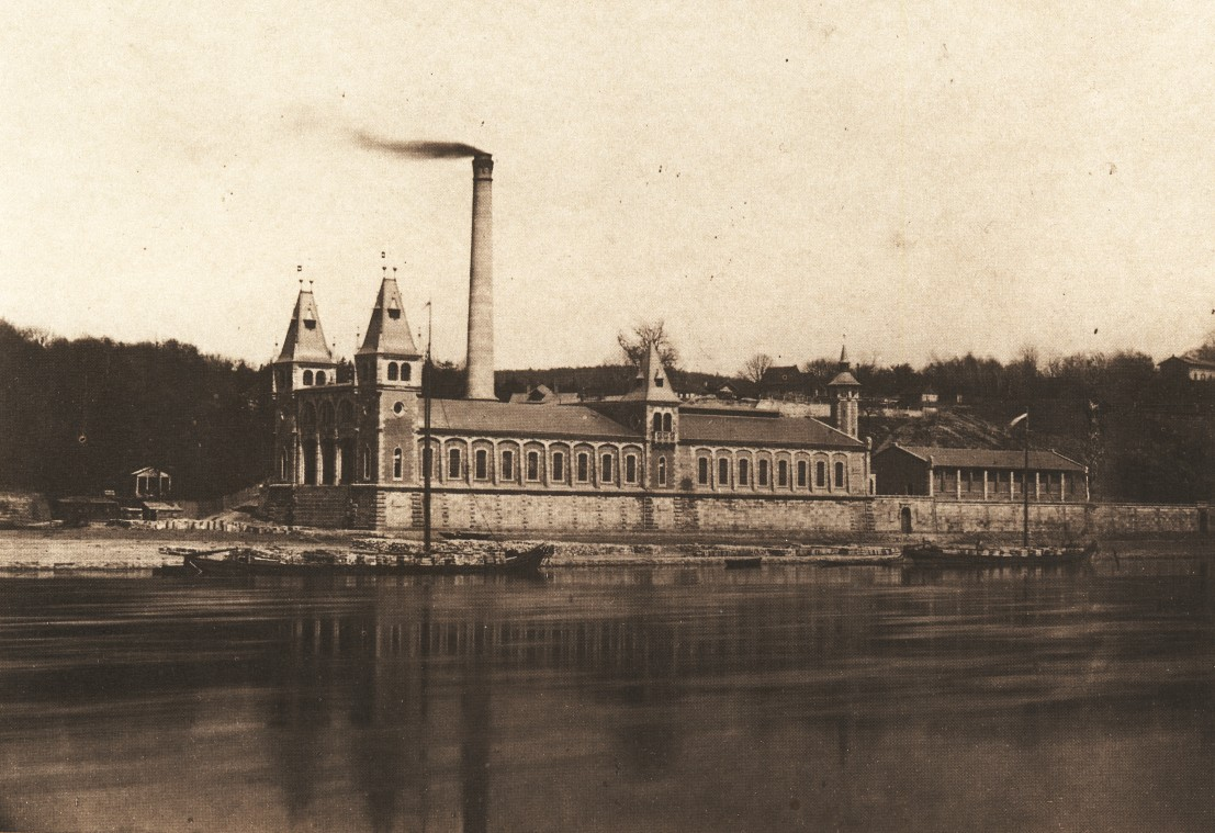 Aufnahme des Wasserwerks Saloppe in Dresden